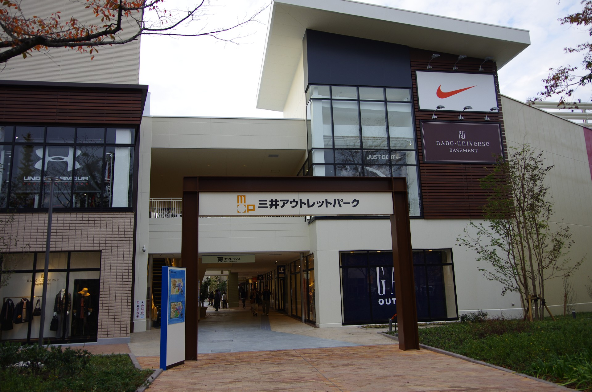 三井アウトレットパーク倉敷の東エントランス